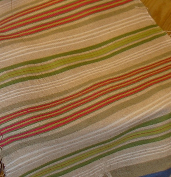 Mönsterrapport i kuddvar.